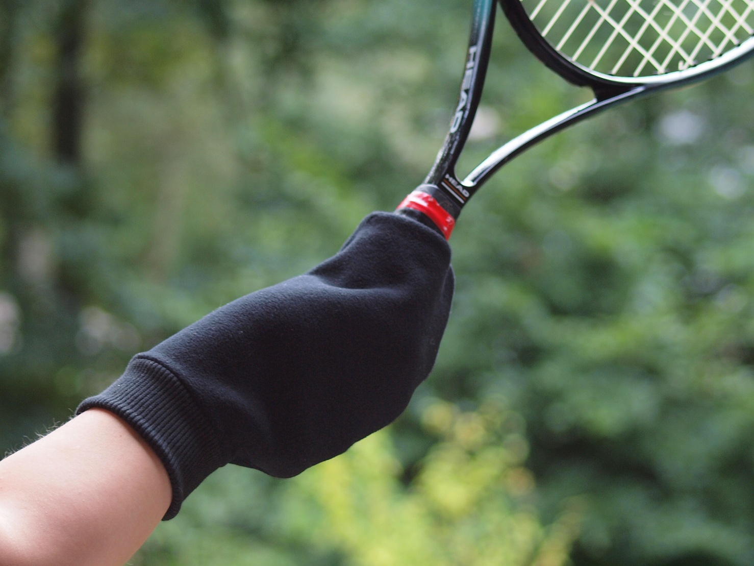 tennishandschoen